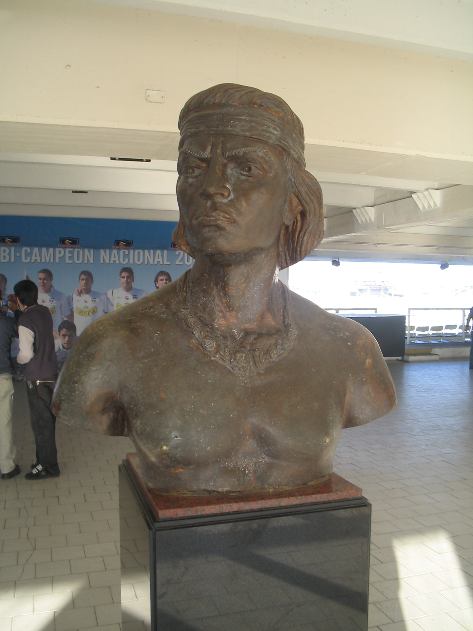 Cacique Colo-Colo, Estadio Monumental, Santiago de Chile